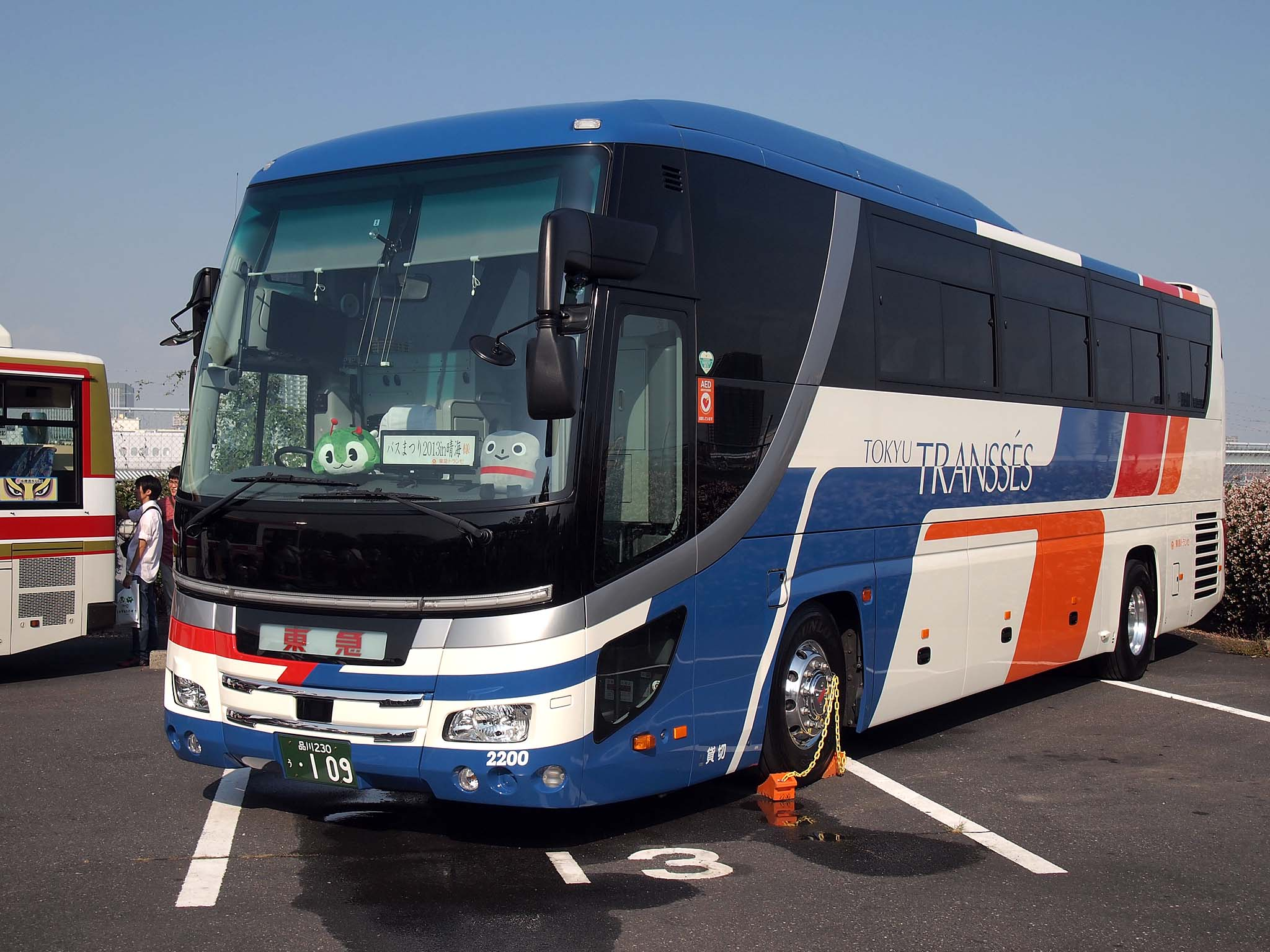 2013年に導入された東急トランセの貸切車。 型式：日野・セレガSHD QPG-RU1ESBA 登録番号：品川230う・109 撮影地：東京都中央区、晴海埠頭客船ターミナル駐車場 都営バス「バスまつり2013 in晴海」展示車両